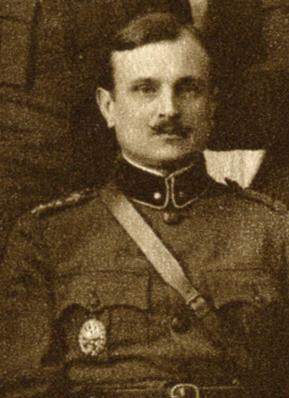 Kinrdalmajaor Jaan Soots (et)